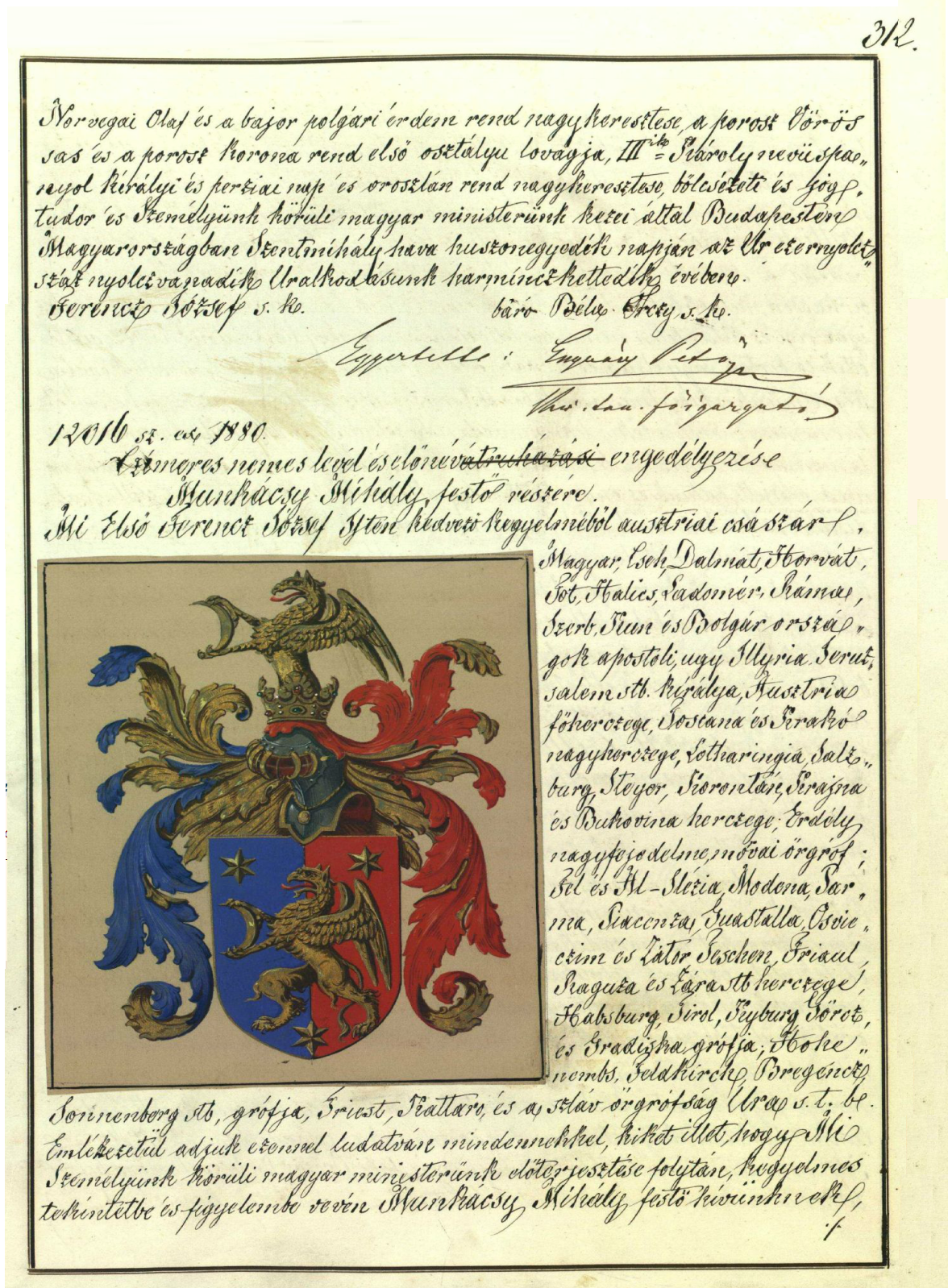 Munkácsy Mihály címere a Királyi Könyvekben, 1880 Munkácsy nemességének bejegyzése a Királyi Könyvekben Polgári Kori Kormányhatósági Levéltárak – Király Személye Körüli Minisztérium – Királyi Könyvek (K 19)– LXVIII. – 312-314. p Magyar nemesi cím Munkácsy Mihálynak "méltányosságból" Ferenc József 1880. december 12-én hagyta jóvá a 110 éve elhunyt Munkácsy Mihály magyar nemesi címét. A festő egy olyan kitüntetésre hivatkozva kérvényezte a nemességet, amellyel csak oszták lovagi rang járt volna együtt, Tisza Kálmán miniszterelnök ennek ellenére méltányosságból javasolta a cím megadását.